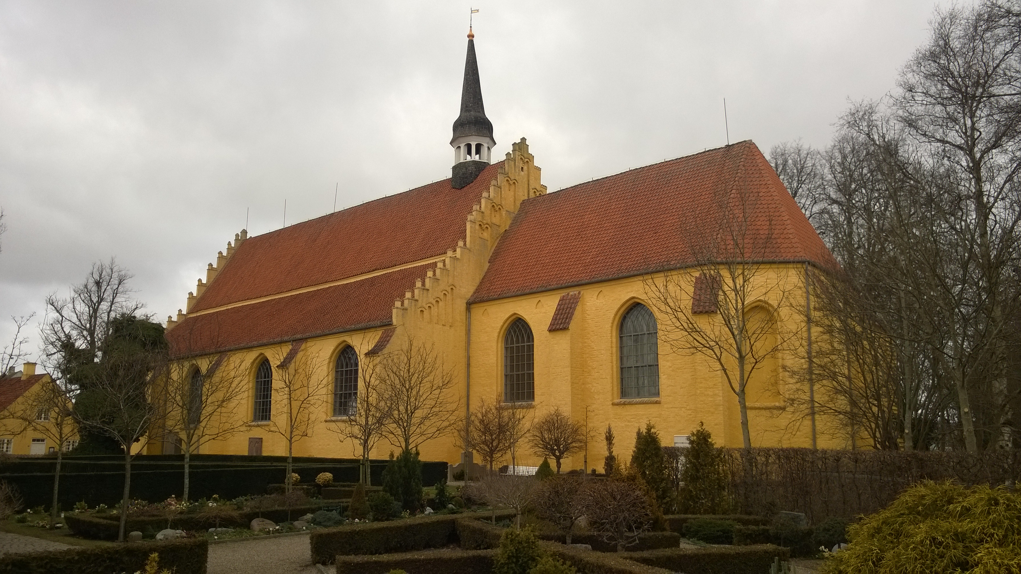 Kirken set fra kirkegården (SØ)